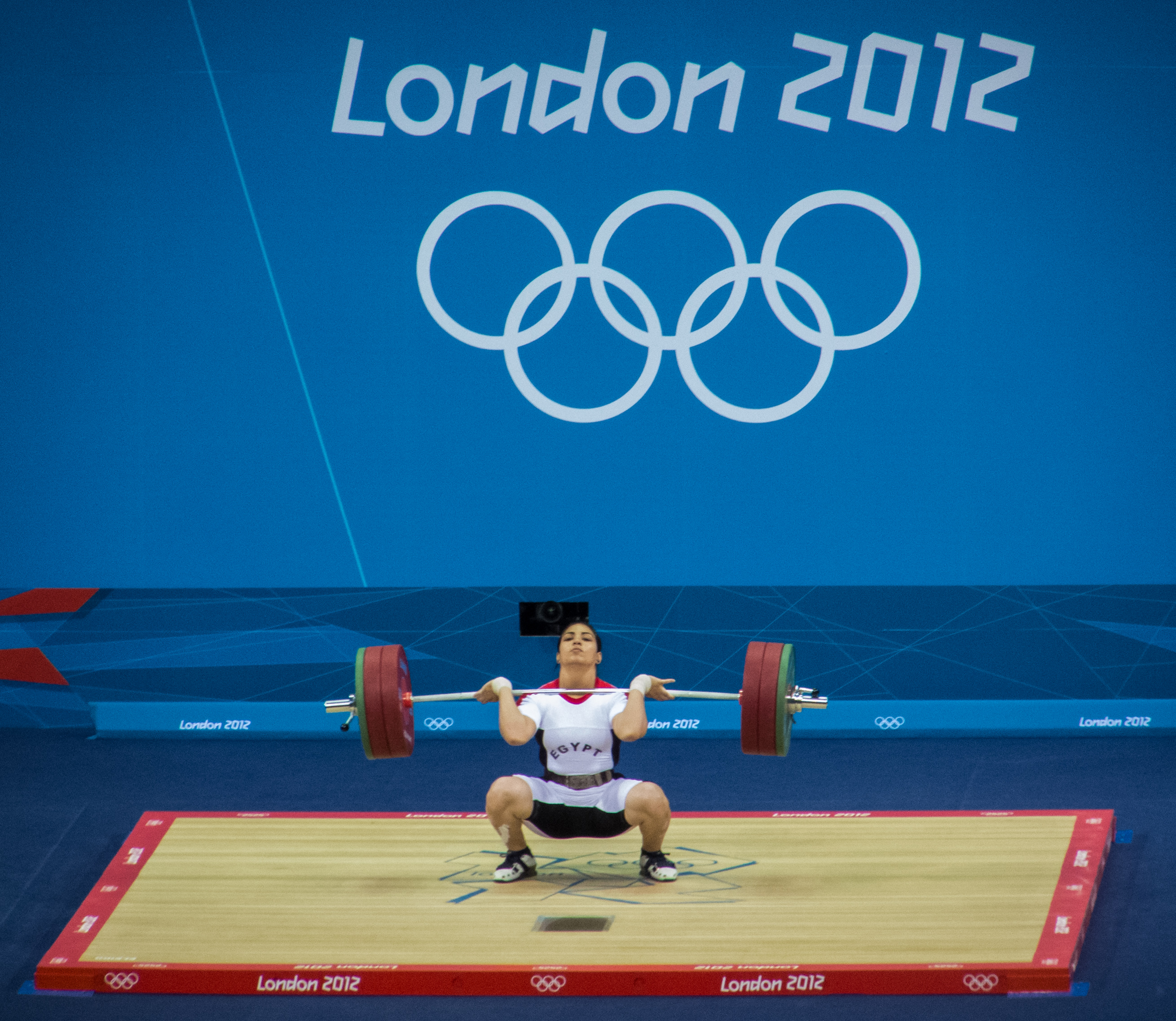 Abeer Abdelrahman, Egypt